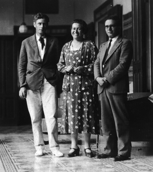 Salarrué (izquierda) en compañía de la escritora chilena Gabriela Mistral (al centro) y Adolfo Ortega Díaz.